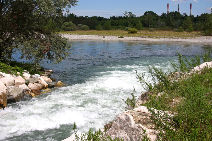 Lo sbocco del Canale Cavour nel fiume Ticino a Galliate (NO)